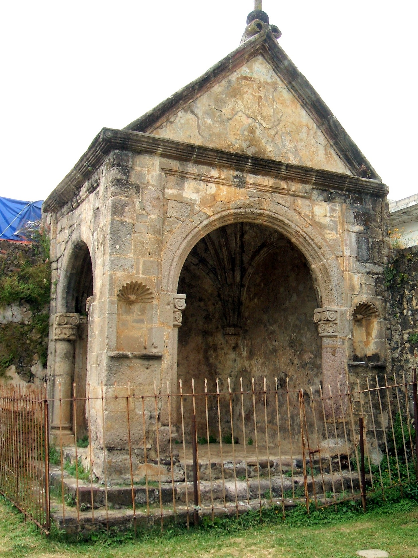 Capilla posa en el atrio del conjunto conventual dominico de Tepoztlán, Morelos